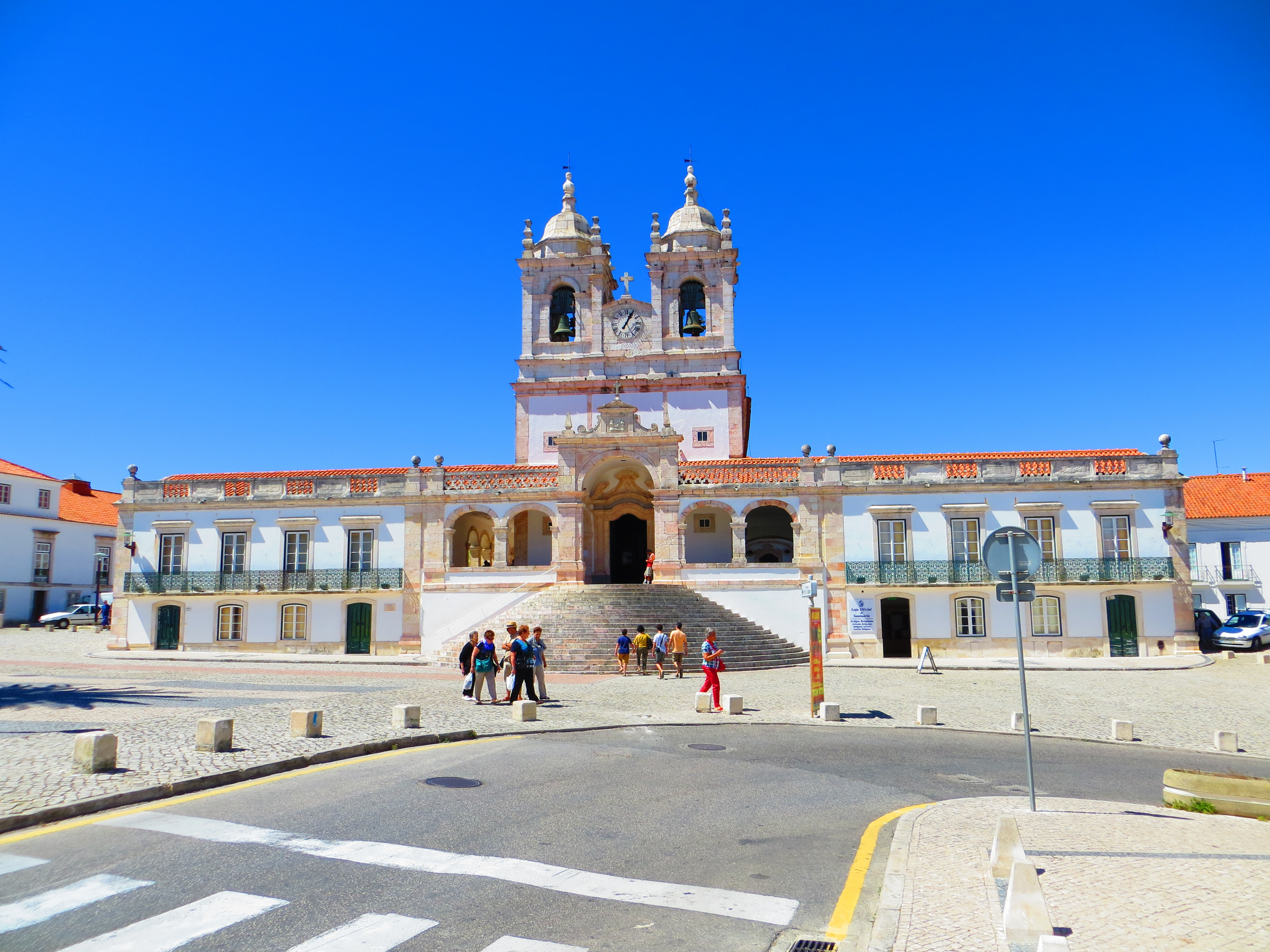 Confraria Nossa Senhora Da Nazaré